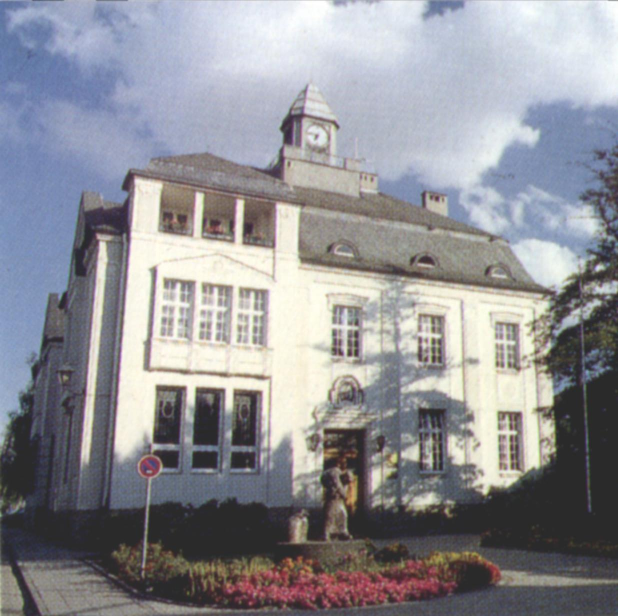 Ehemaliges Rathaus der Stadt Wevelinghoven